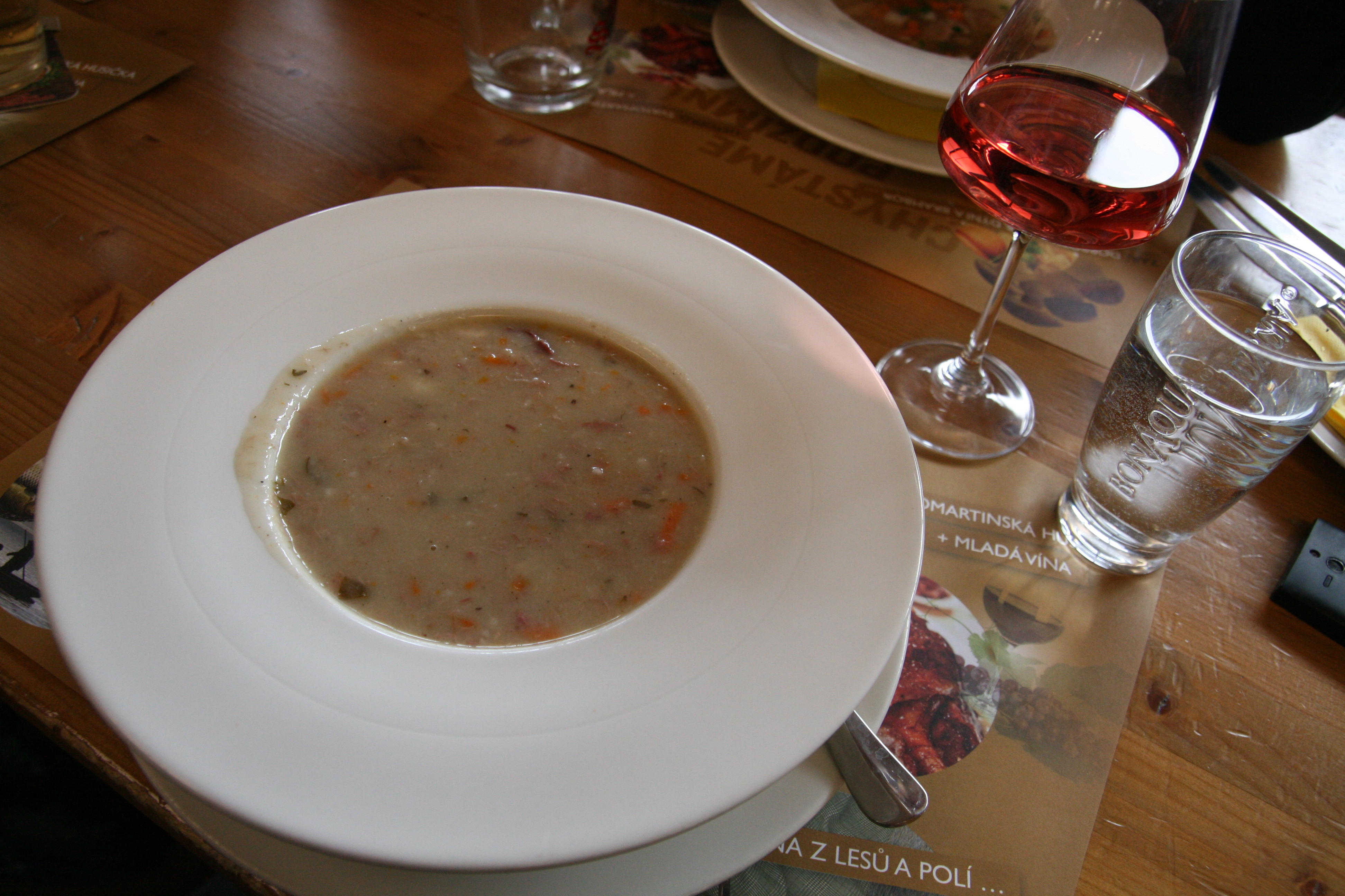 Wikipedisté zasadili (reálnou) lípu srdčitou v Přírodní zahradě u medláneckého rybníka v Brně-Medlánkách ve spolupráci s iniciativou Sázíme stromy. Posezení v restauraci Velorex s husími hody po sázení. Husí kaldoun a Svatomartinské víno.